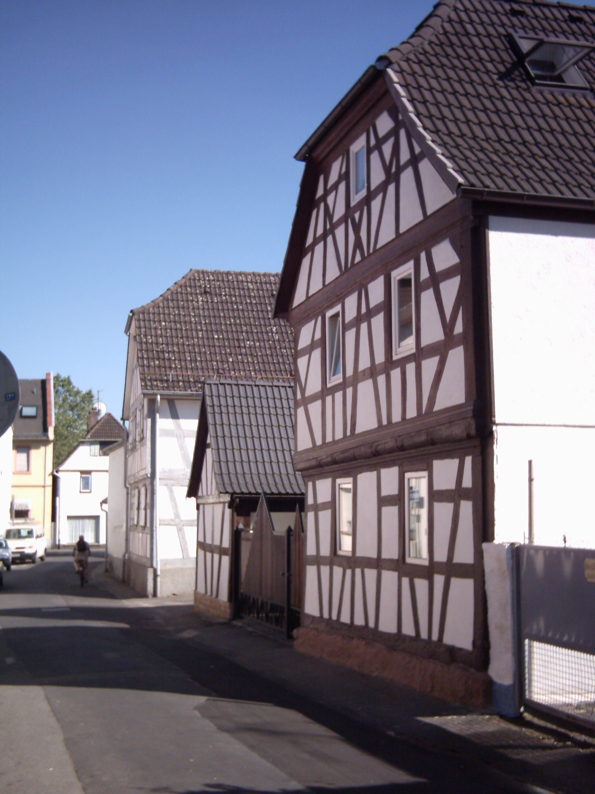 Fachwerkhäuser in der Straße "Alt-Bieber" in Bieber